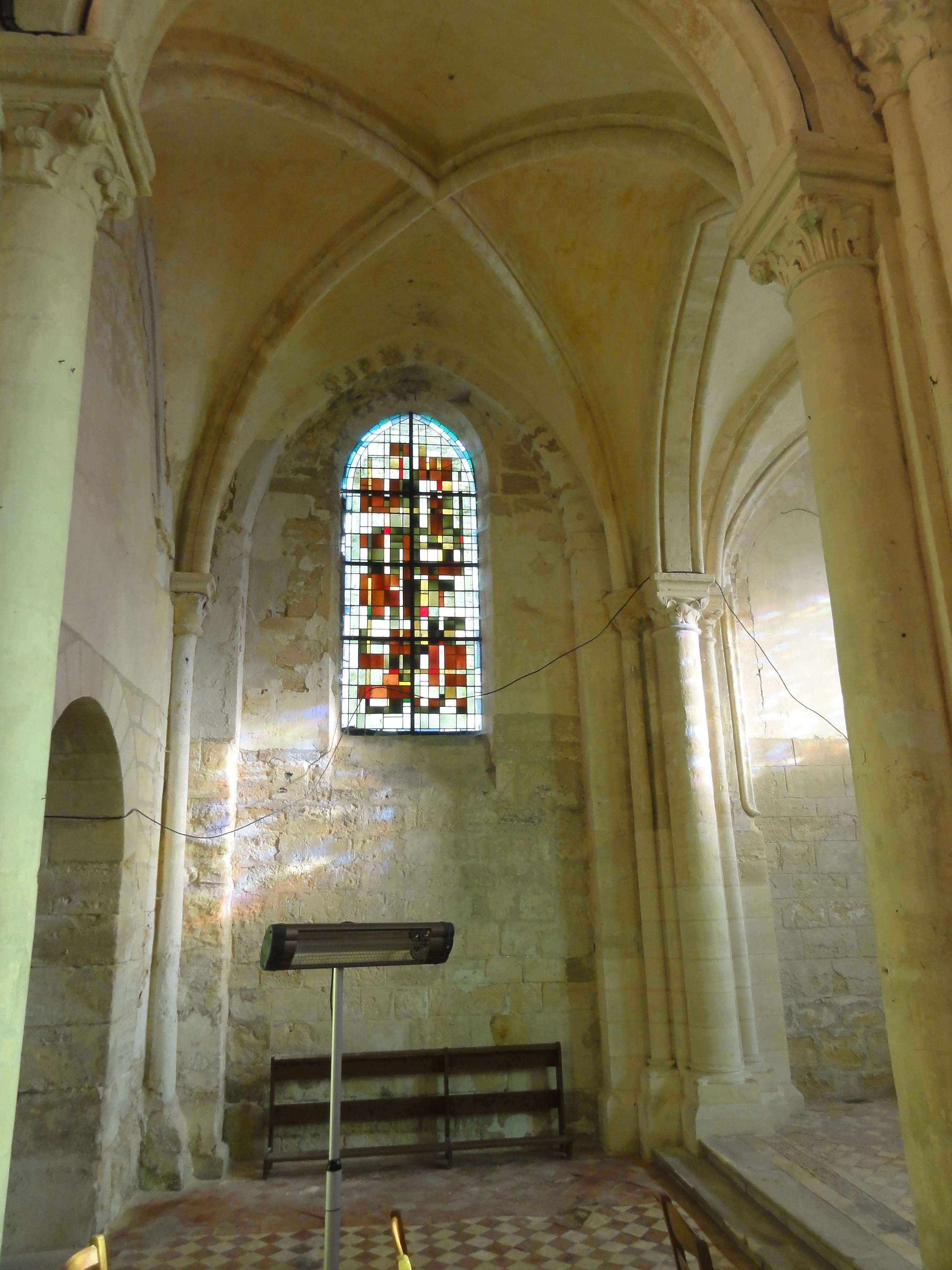 Intérieur de l'église - voir titre.